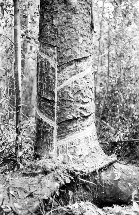 Negatief. Het aftappen van een rubberboom (Agathis borneensis Warb) door het Boschwezen op West-Borneo